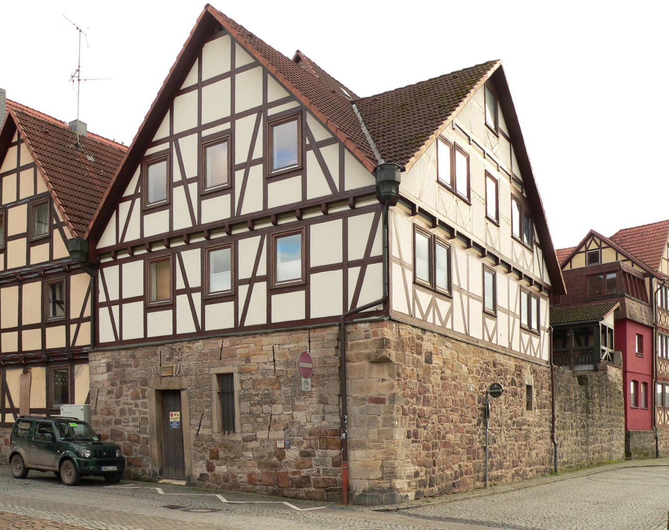 Historischer Badstoven in Hann Münden